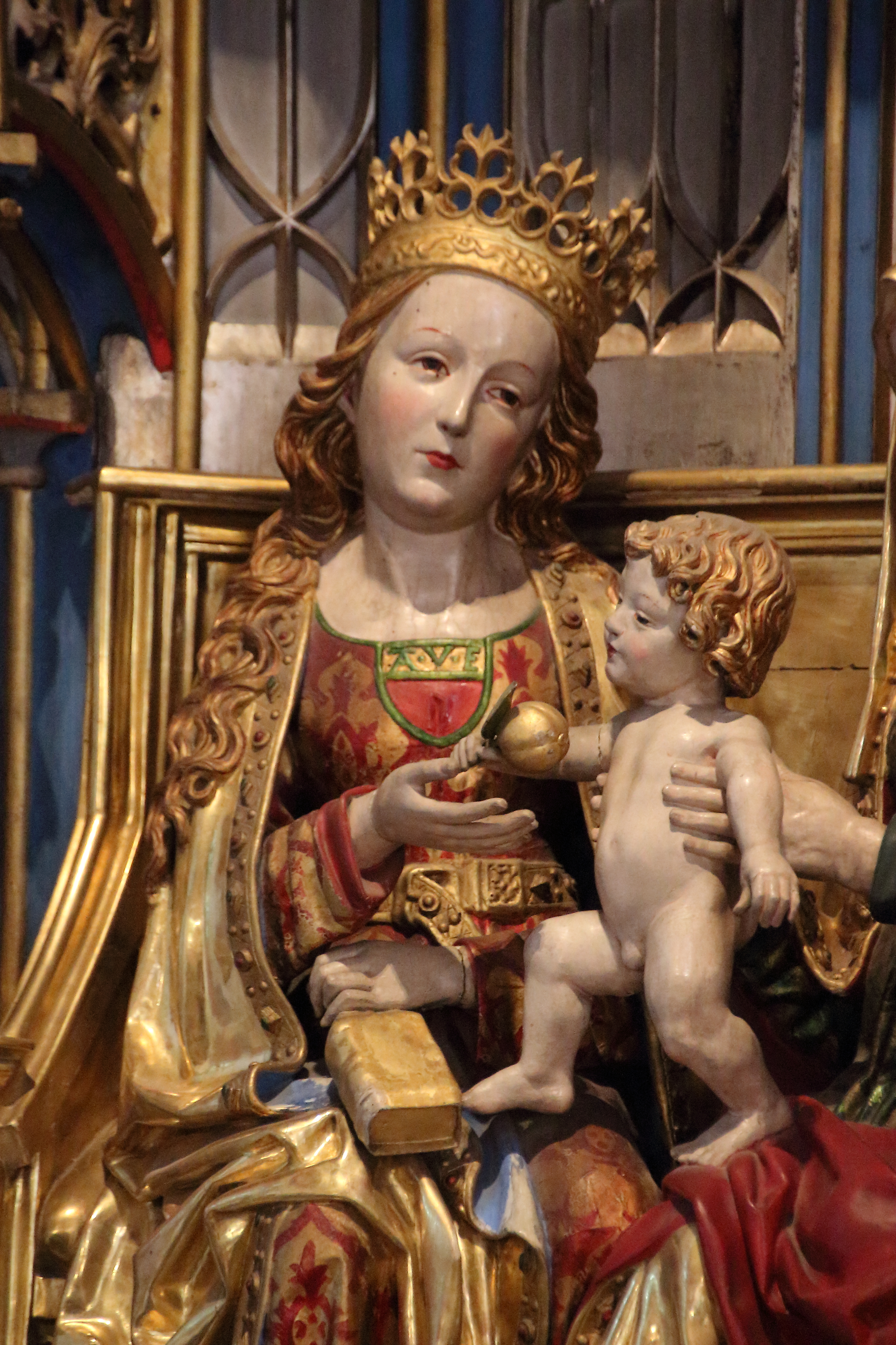 Detail der Anna Selbdritt-Gruppe, Johannesaltar. "Meister mit dem Brustlatz", um 1500. St. Valentin, Kiedrich